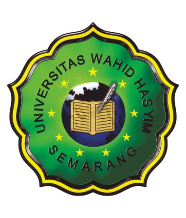 Berkas Logo Universitas Wahid Hasyim Semarang